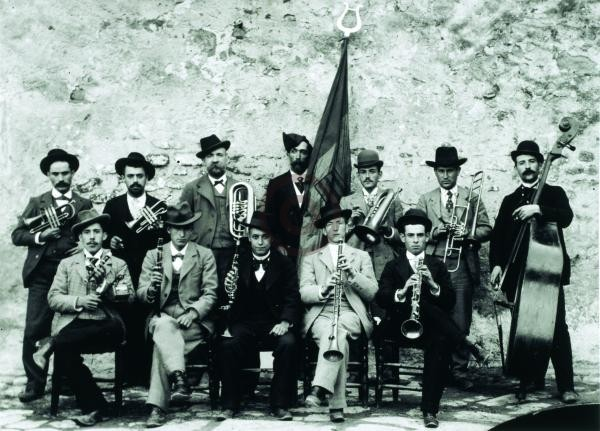 Cobla catalana de l'any 1909 / Catalan Cobla from 1909